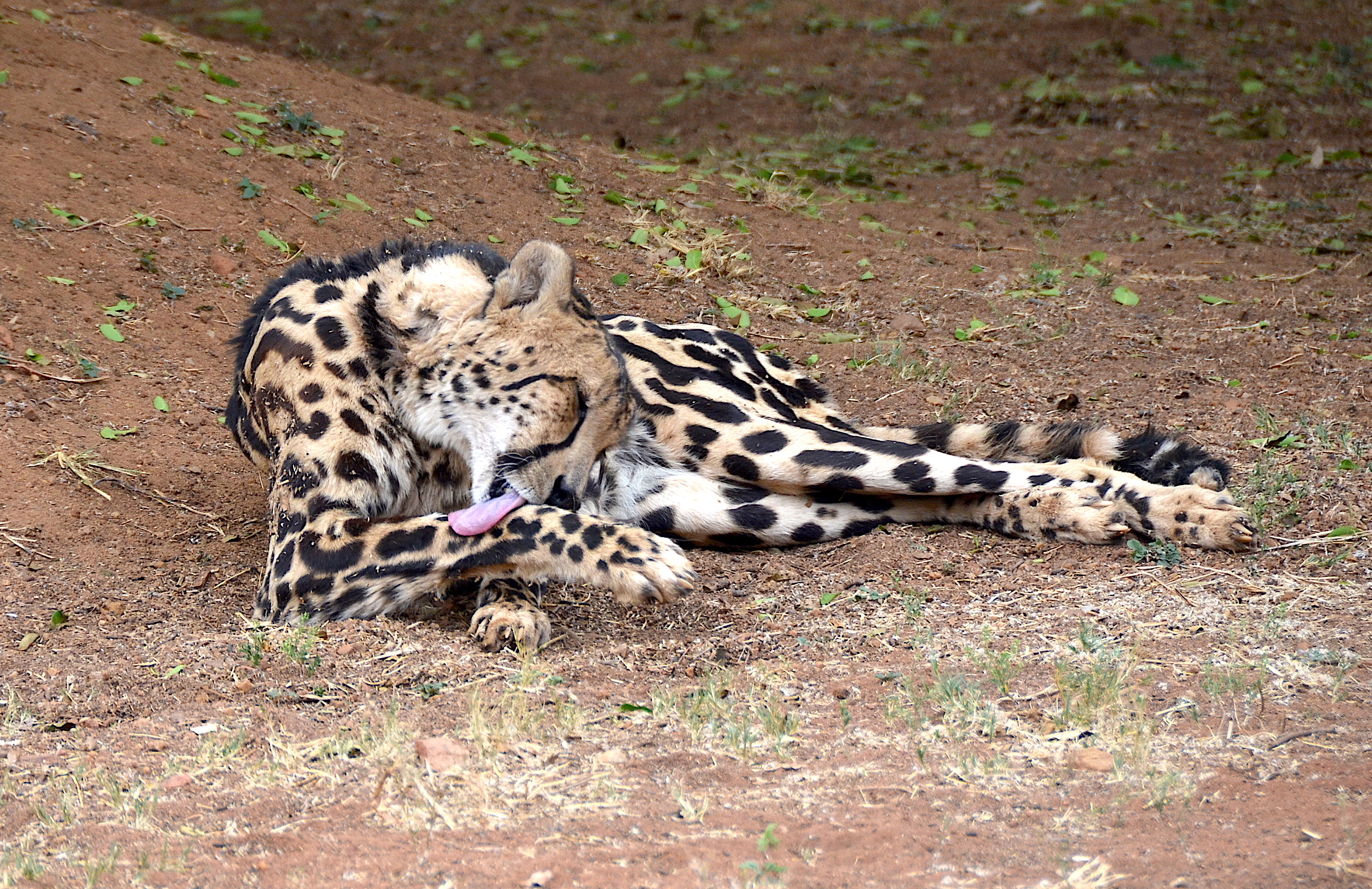 Pflegeverhalten eines Königsgeparden im De Wildt Cheetah Research Centre (Südafrika)